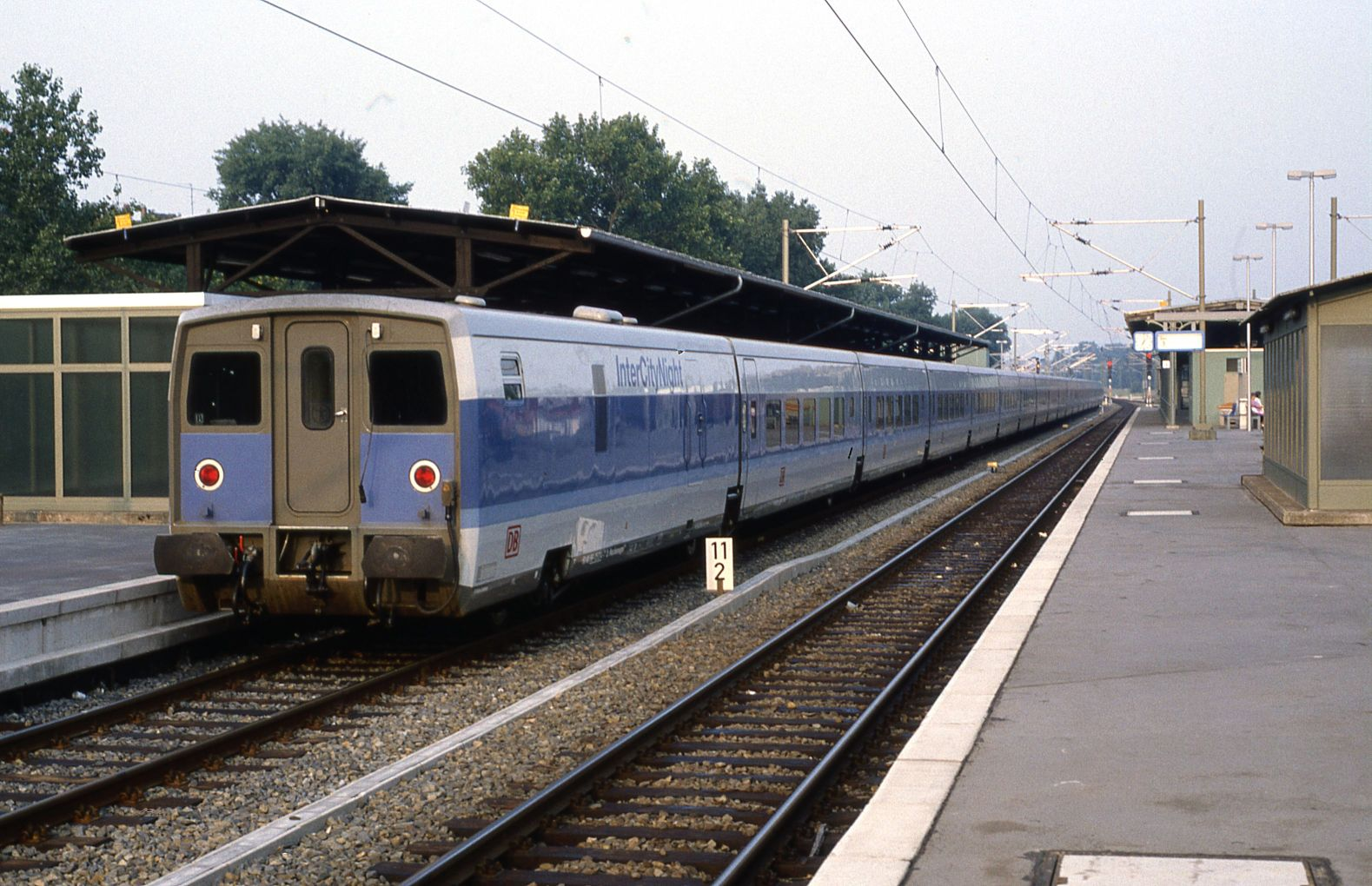 Talgo-Nachtzug der Deutschen Bahn im Bahnhof Berlin-Charlottenburg